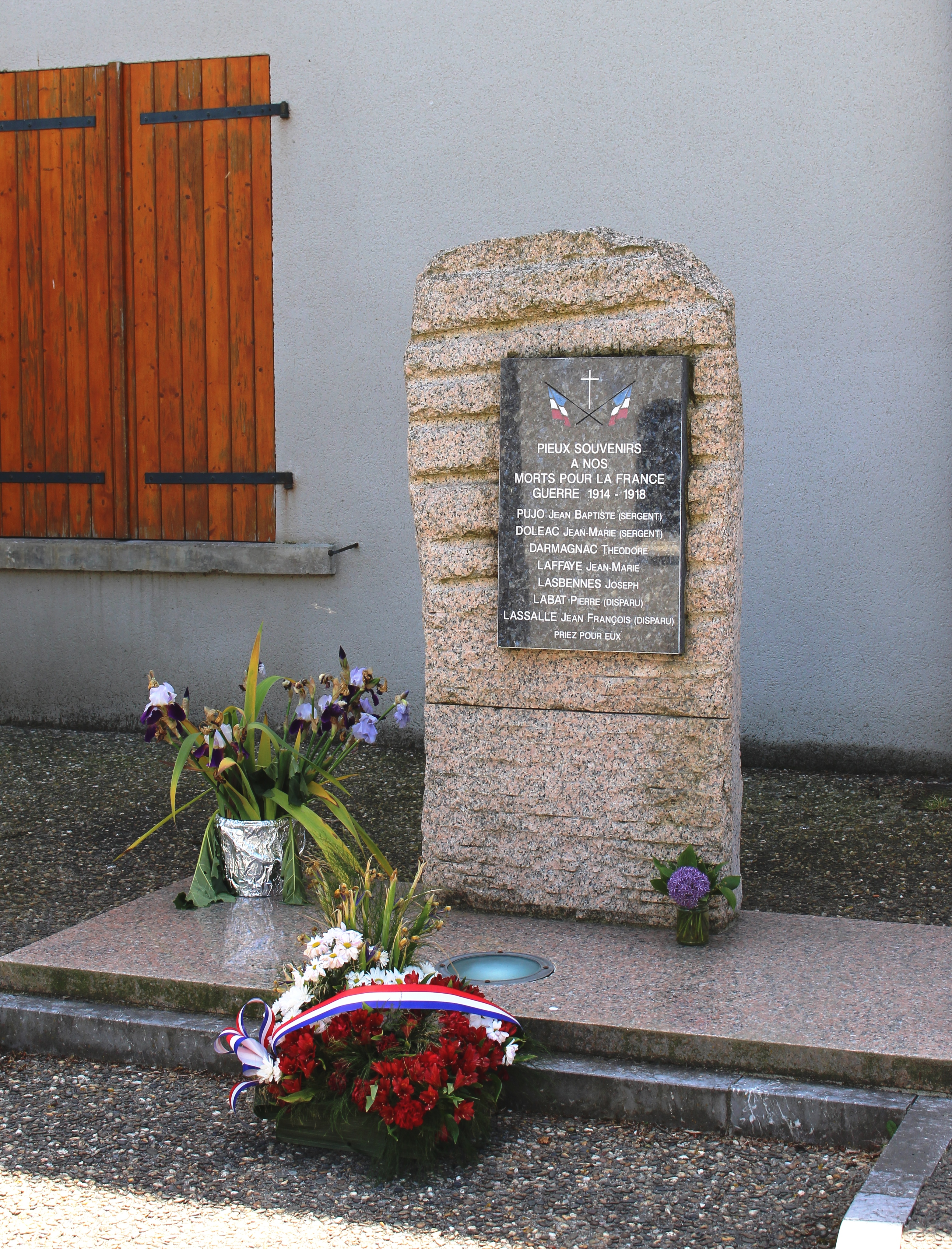 Monument aux morts de Chis (Hautes-Pyrénées)